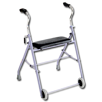 déambulateur